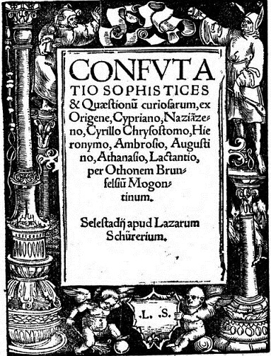 Confutatio sophistices et quaestionum curiosarum, Sélestat, Schurer, 1520